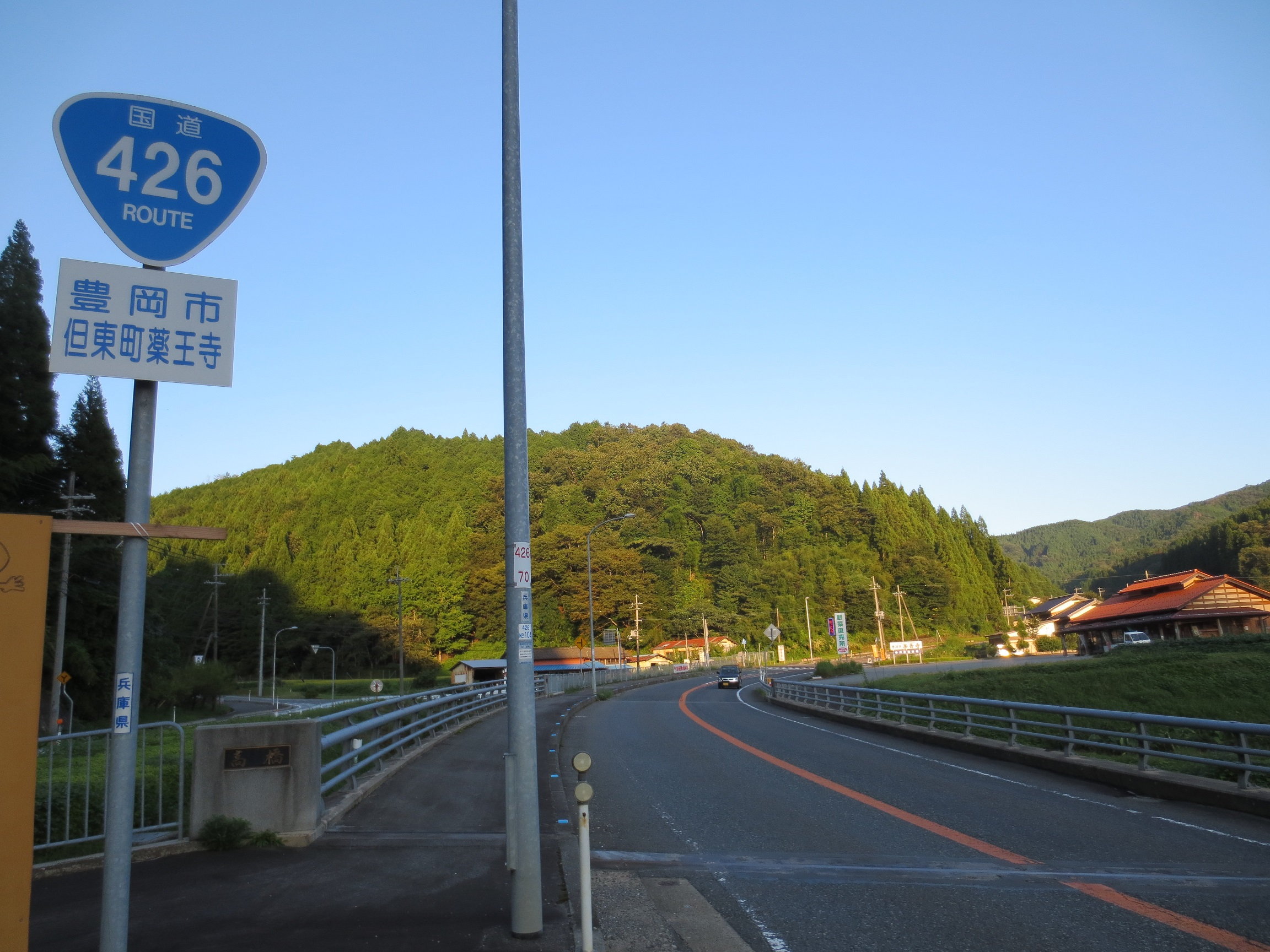 豊岡市但東町薬王寺付近の国道426号。